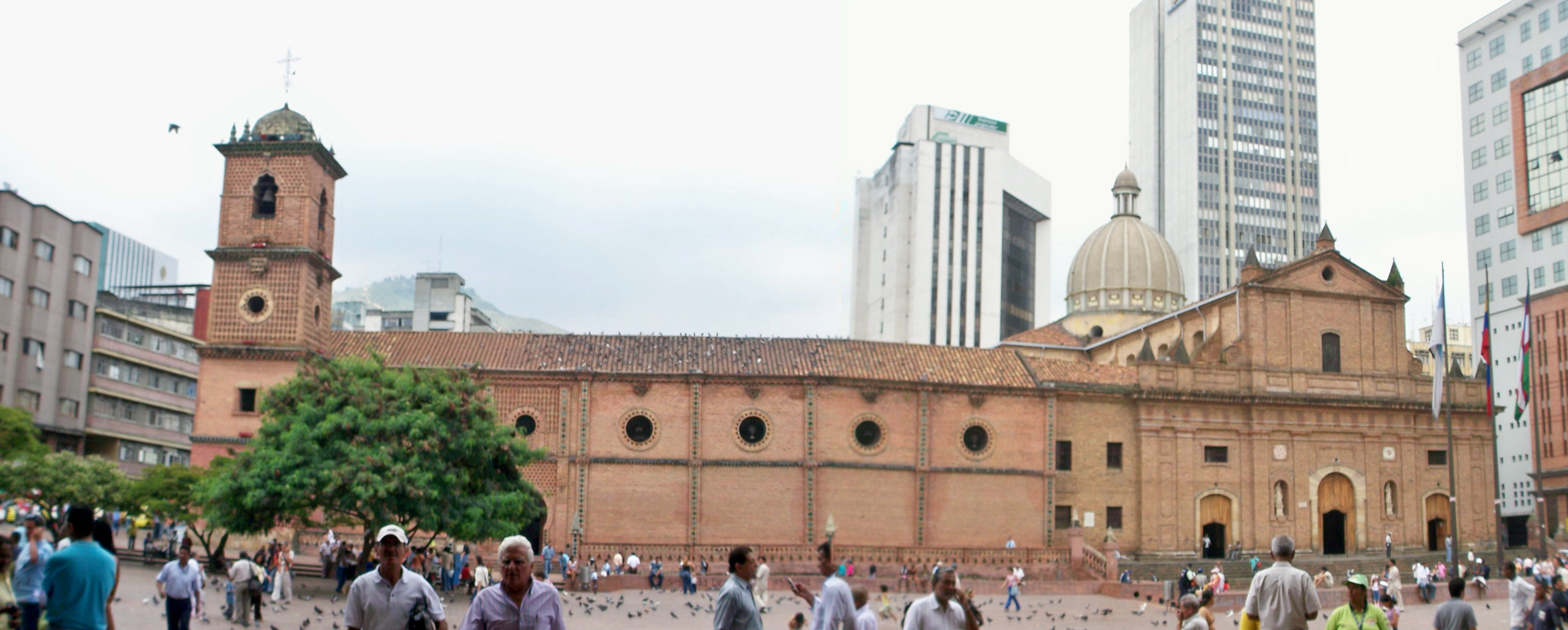 Iglesia y convento de San Francisco, Cali, Colombia